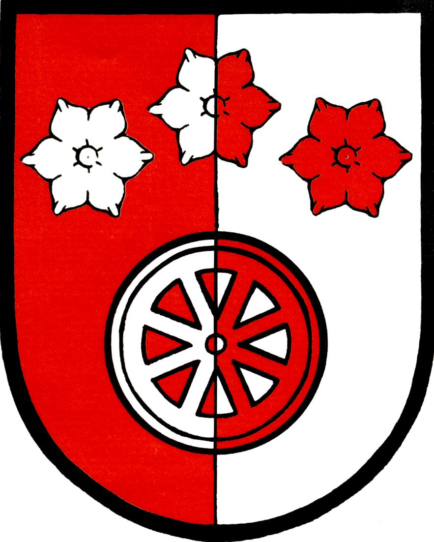 Znak obce Lovečkovice